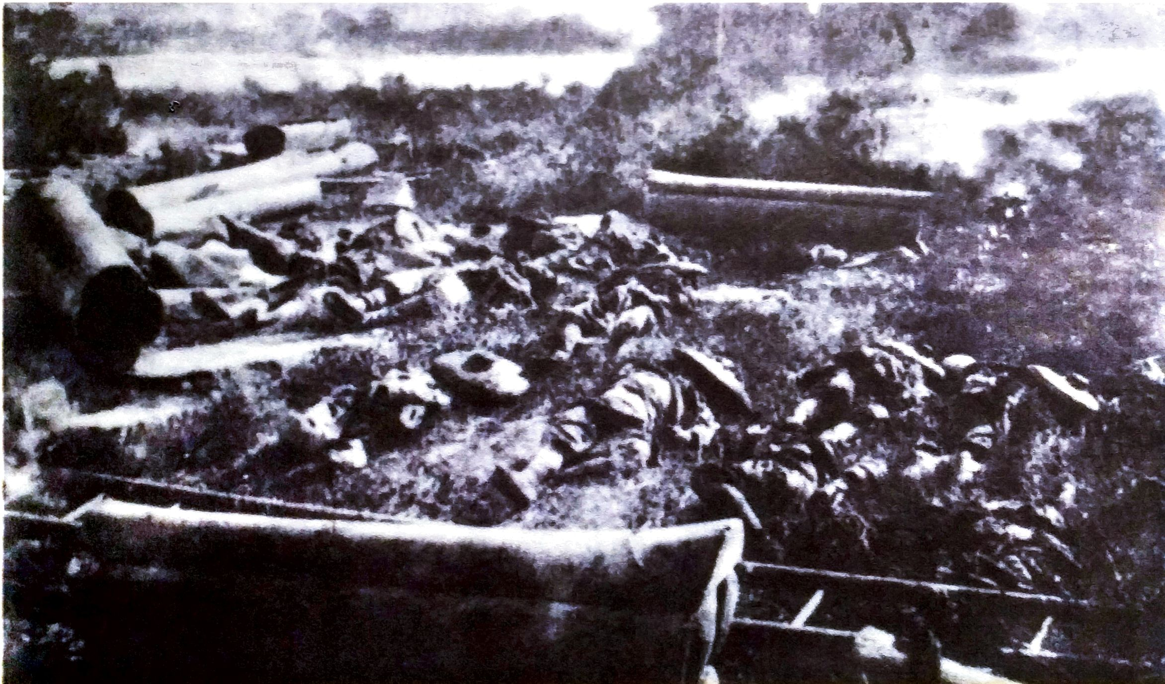 惠州战役战地尸骸